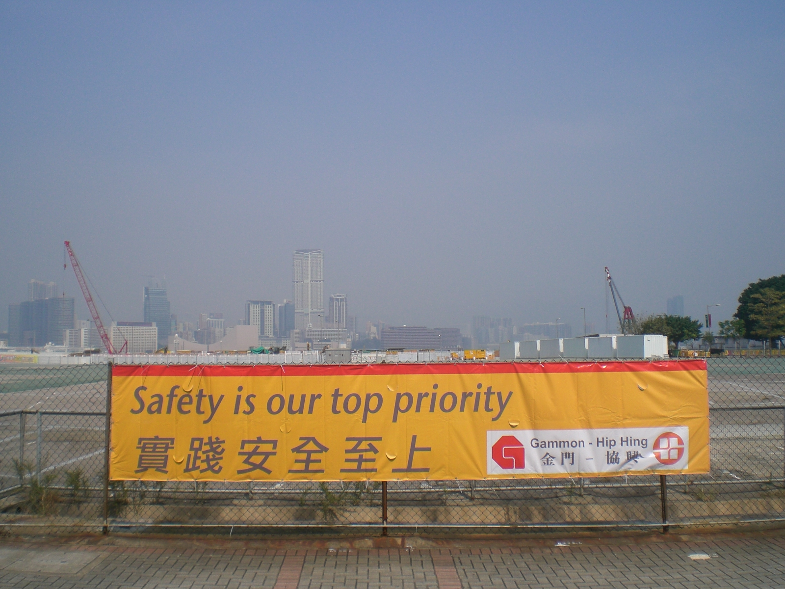 金門建築協興建築聯營（設計A）添馬艦發展工程